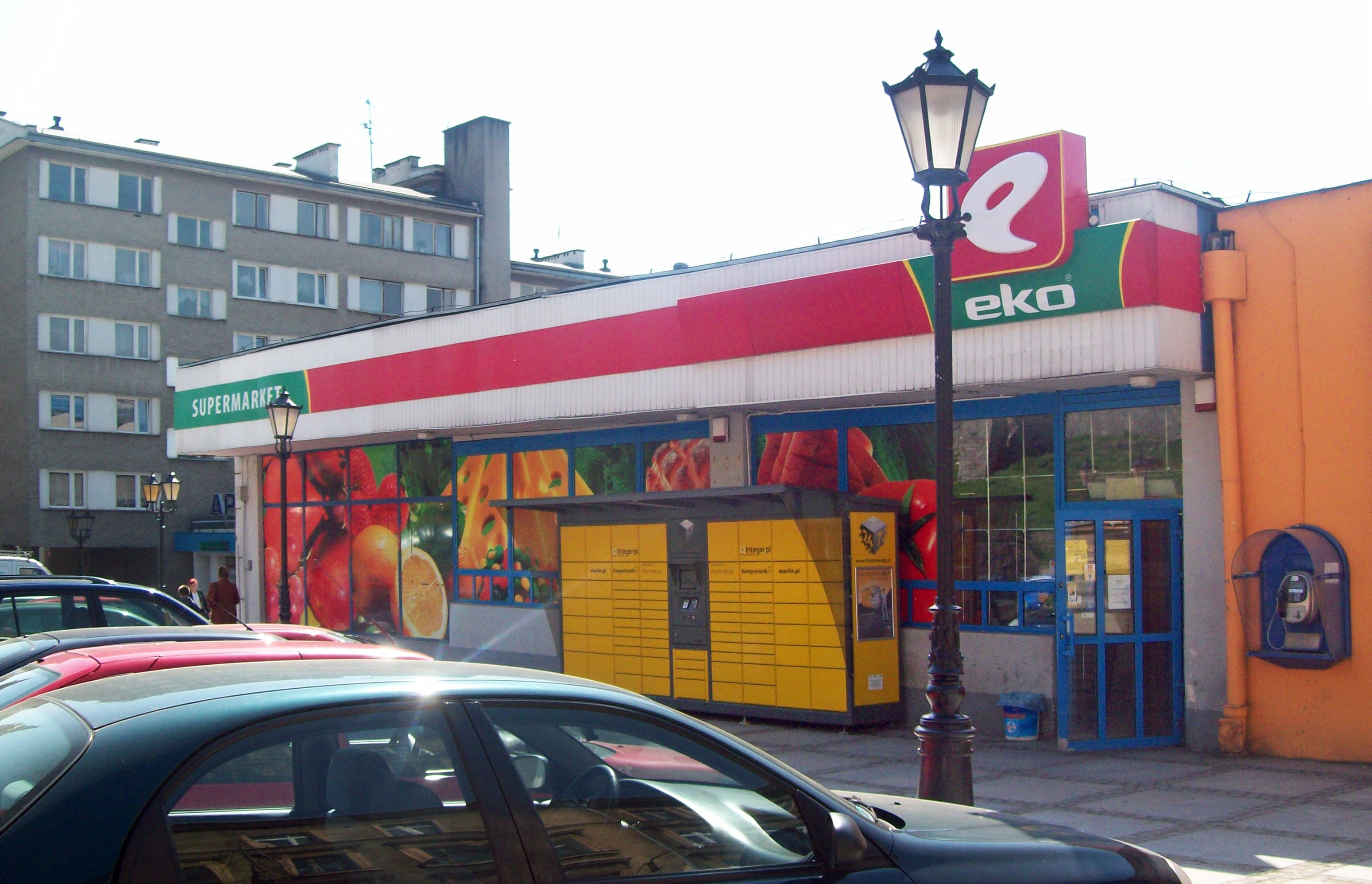 Supermarket Eko w Kłodzku przy ul. Czeskiej